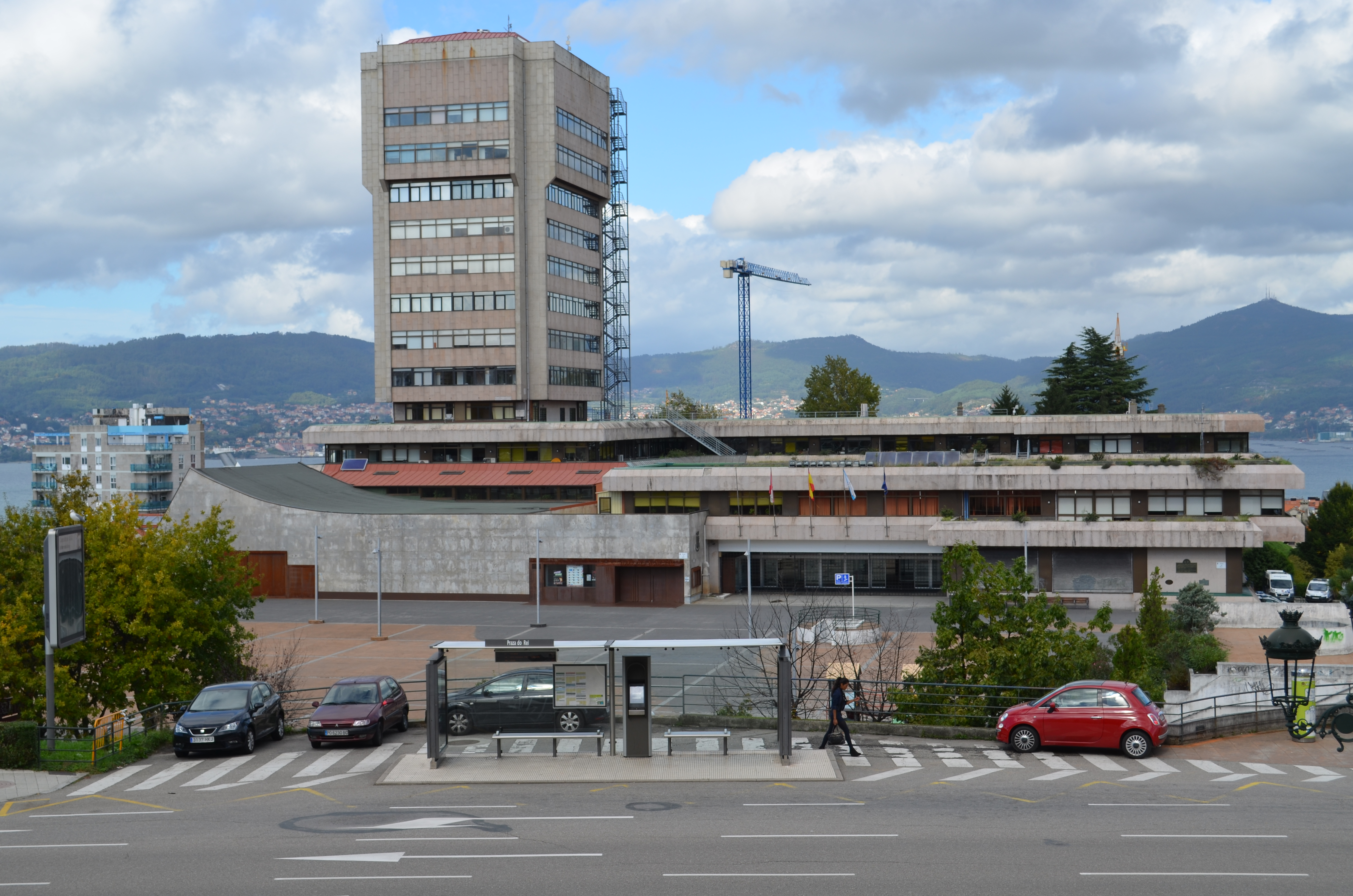 Ayuntamiento, Vigo, Spain